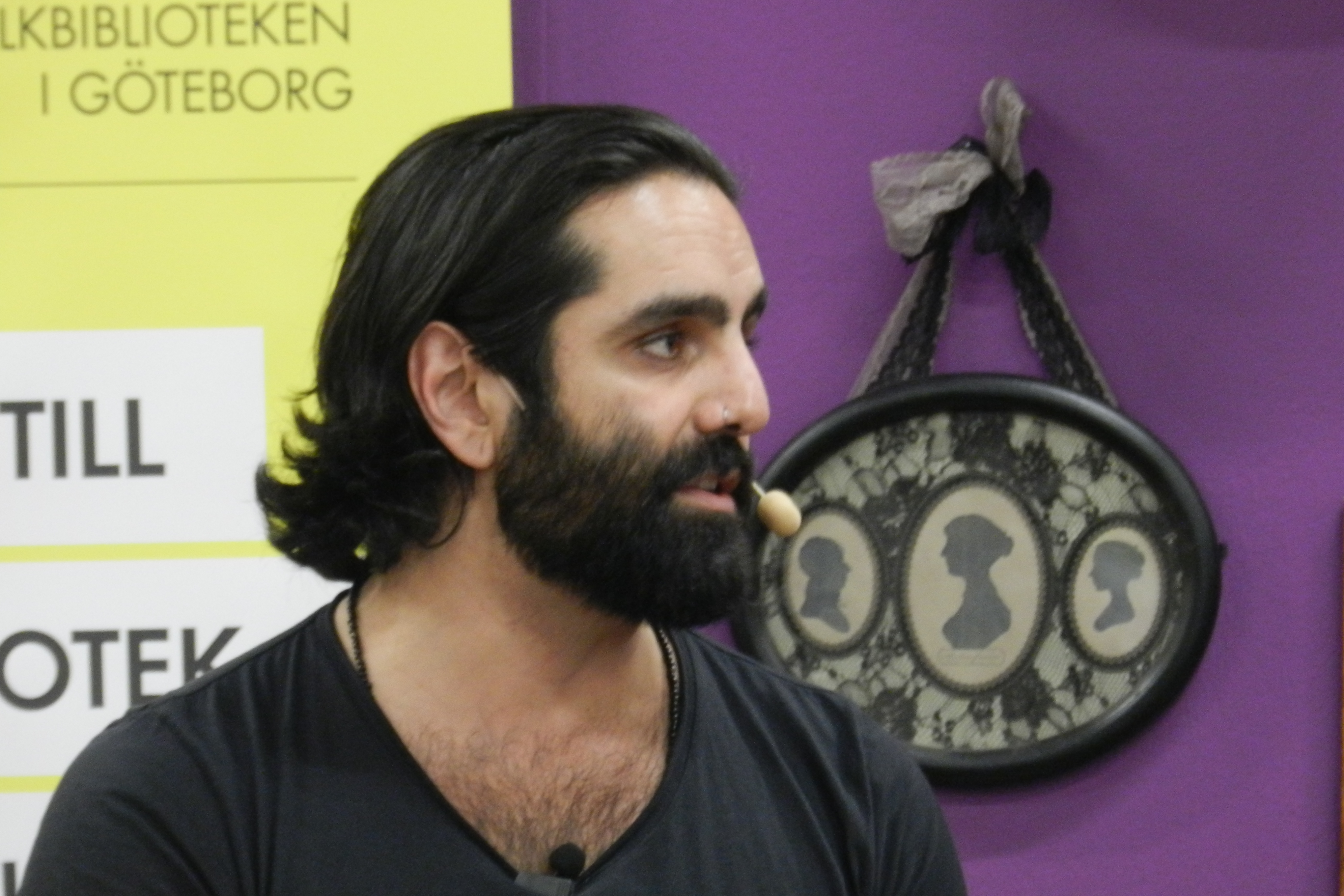 Navid Modiri på Bokmässan i Göteborg 2017.